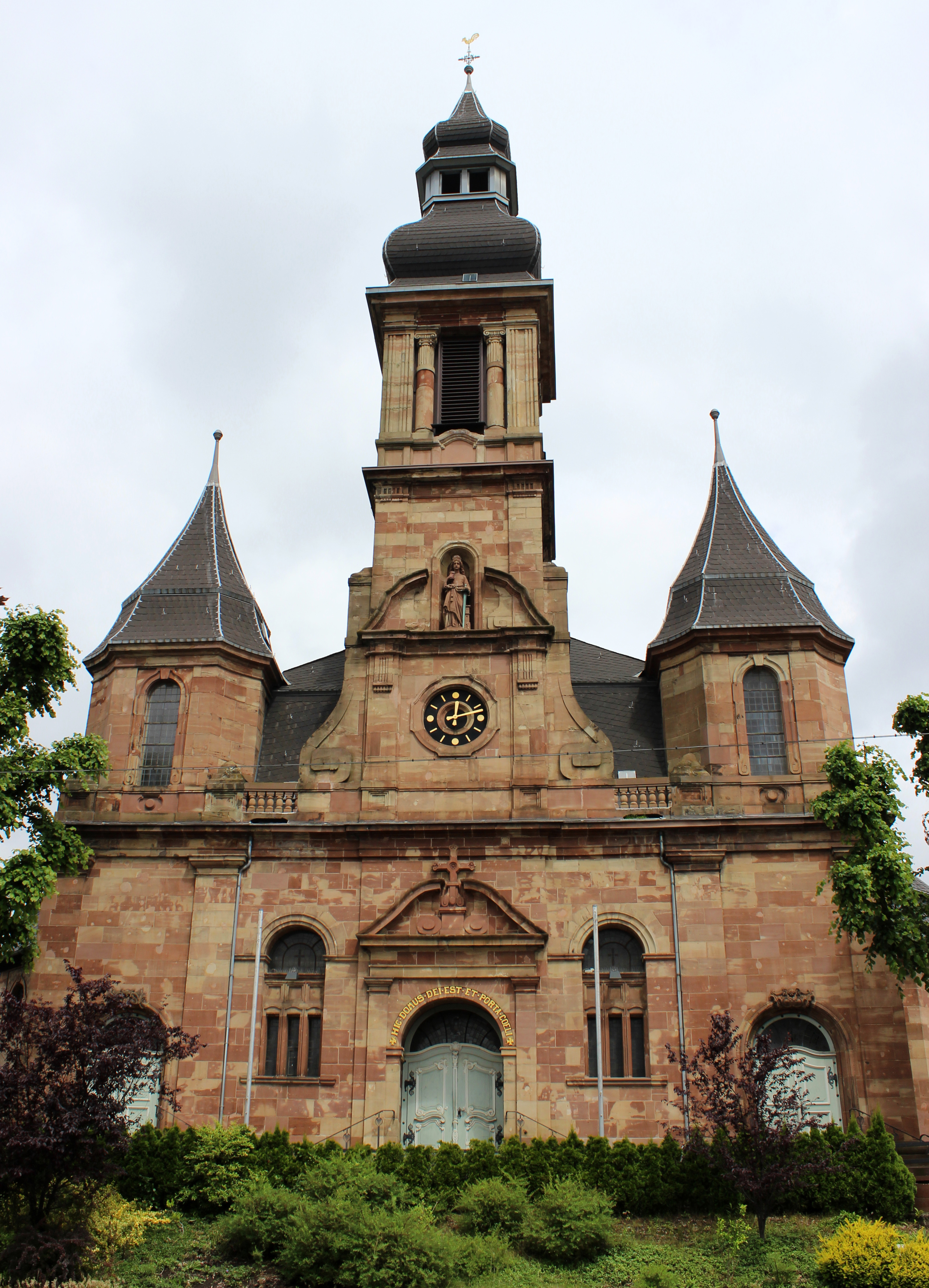 Die katholische Pfarrkirche St. Laurentius in Hülzweiler, einem Ortsteil der Gemeinde Schwalbach, Landkreis Saarlouis, Saarland